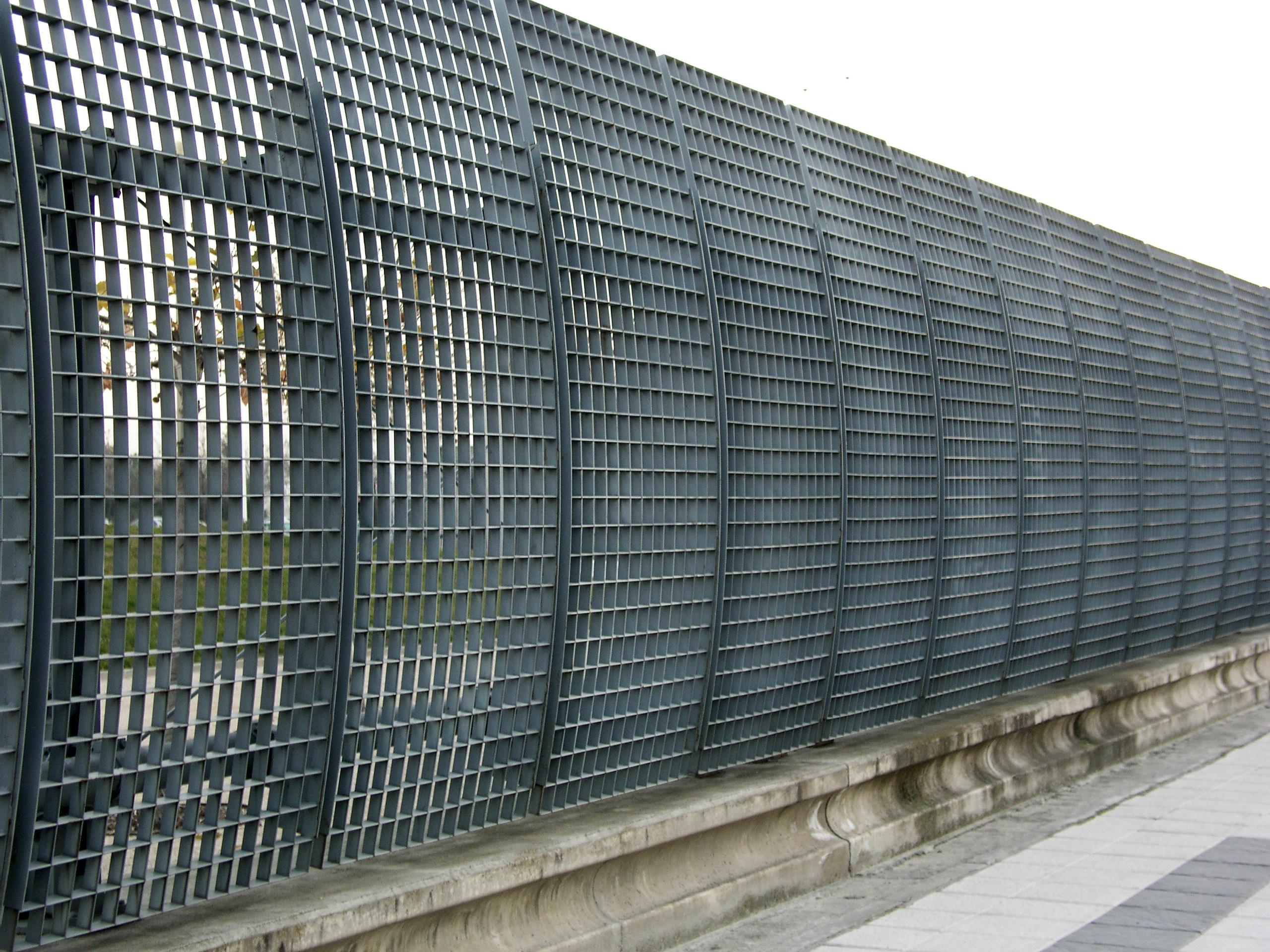 Parque Juan Carlos I, fences. Madrid, Spain